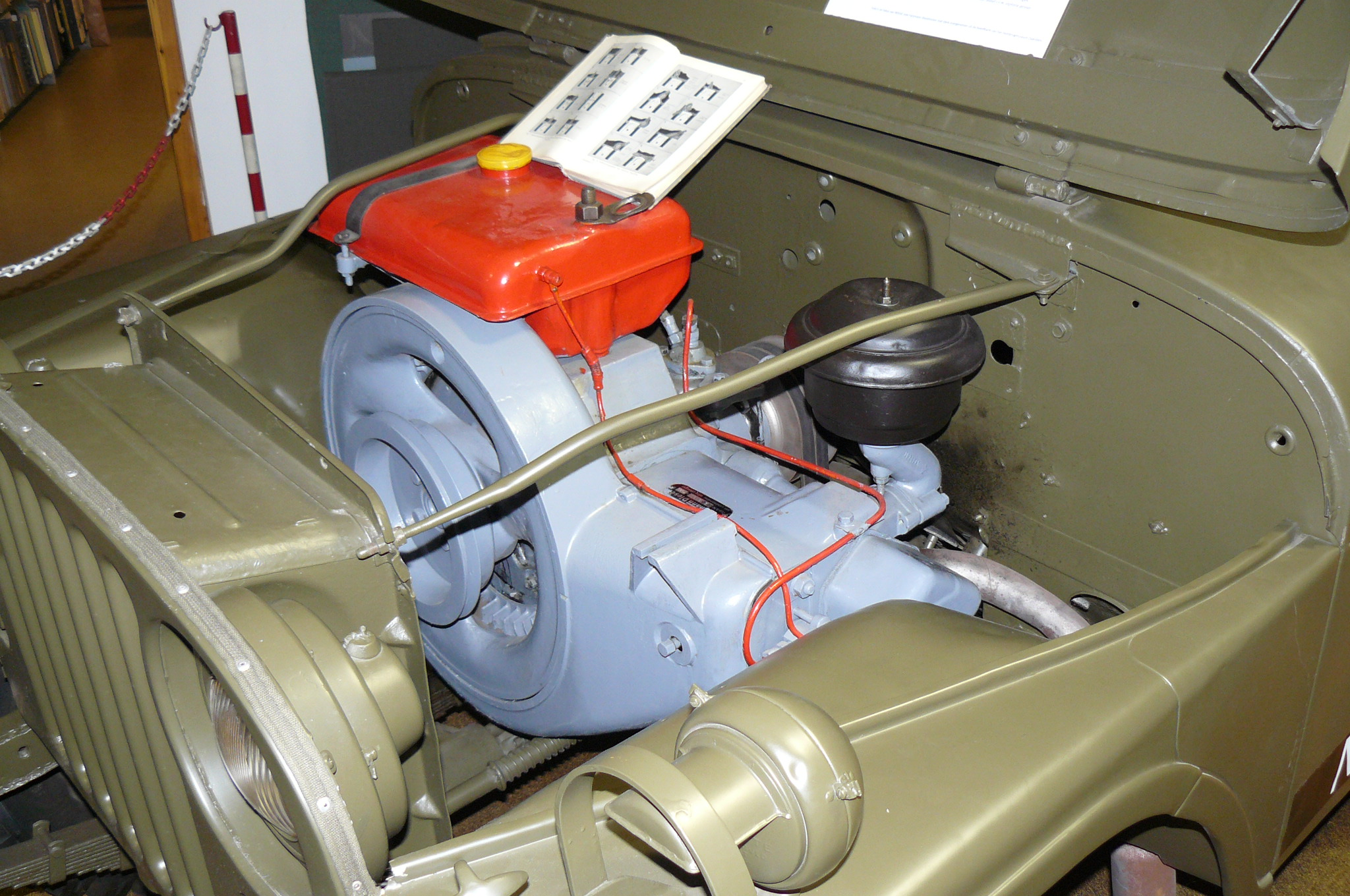 Voor de Artillerie-Inrichtingen is een Nekaf met dieselmotor gemaakt, een uniek exemplaar. Voor het trekken van karren met explosief materiaal was er behoefte aan een “vonkenvrij” voertuig. Eind jaren zestig zijn van een Nekaf alle elektrische componenten verwijderd. De benzinemotor werd vervangen door een Farymann dieselmotor. Het is een aangepaste stationair- en scheepsmotor en kan alleen met een slinger worden gestart. Het telde een cilinder met een inhoud van 850 cm3. Het vermogen was 10 pk. Het enige exemplaar staat in het Regiment Technische Troepen museum te Soesterberg.